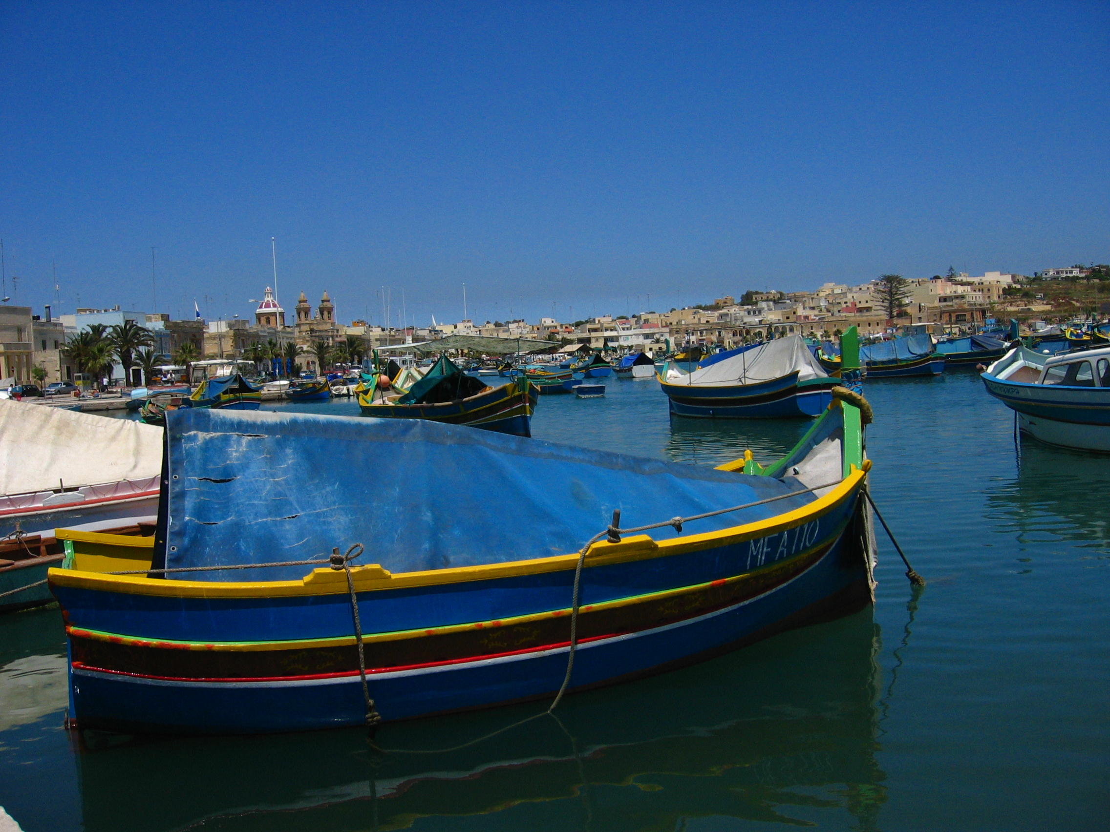 A Maltese kajjik. Marsaxlokk harbor, August 2005.